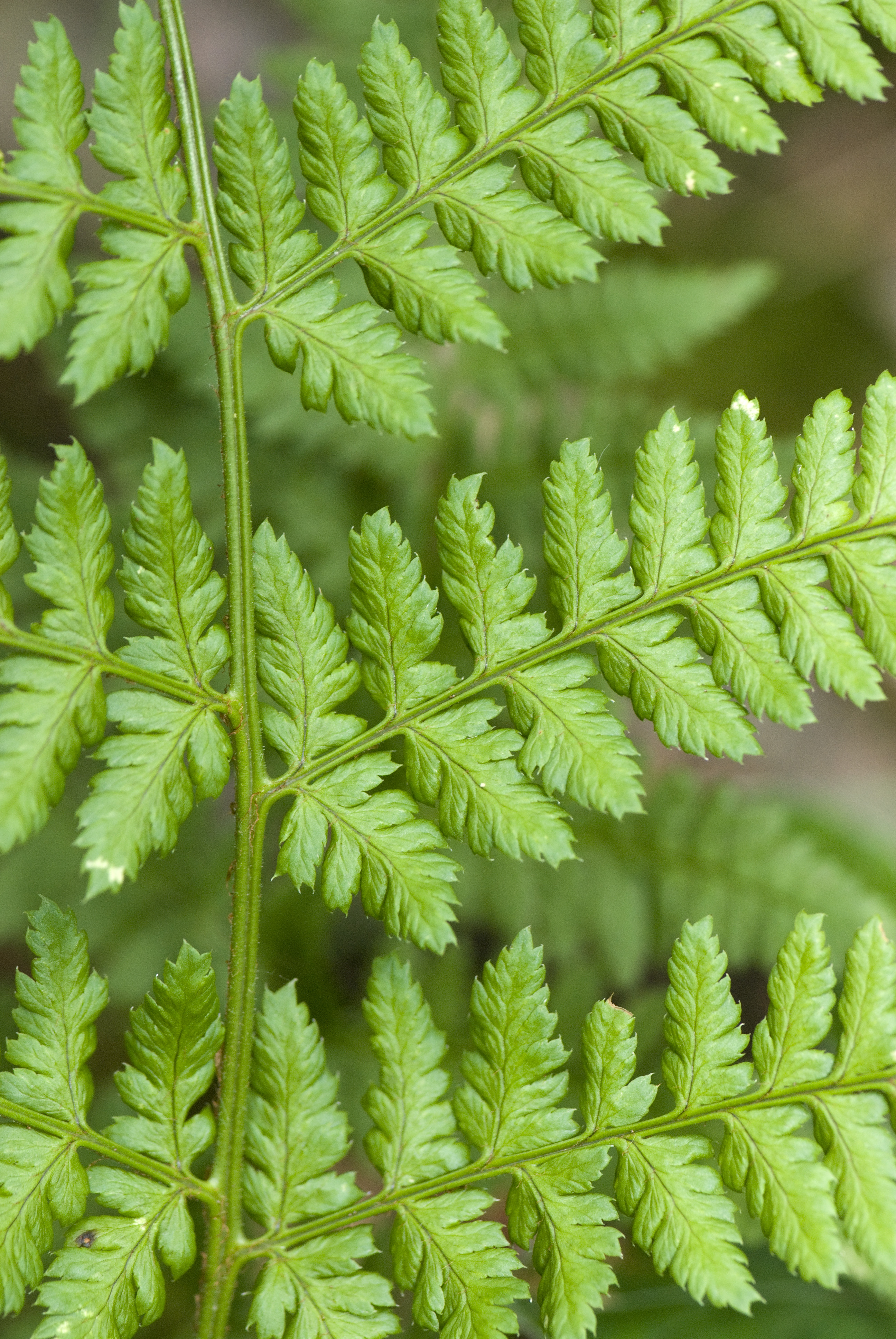 Dryopteris dilatata — Forêt d'Eu (Seine-Maritime), France.